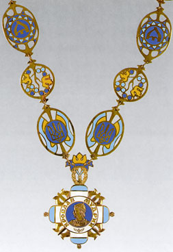 Орден князя Ярослава Мудрого I ст.